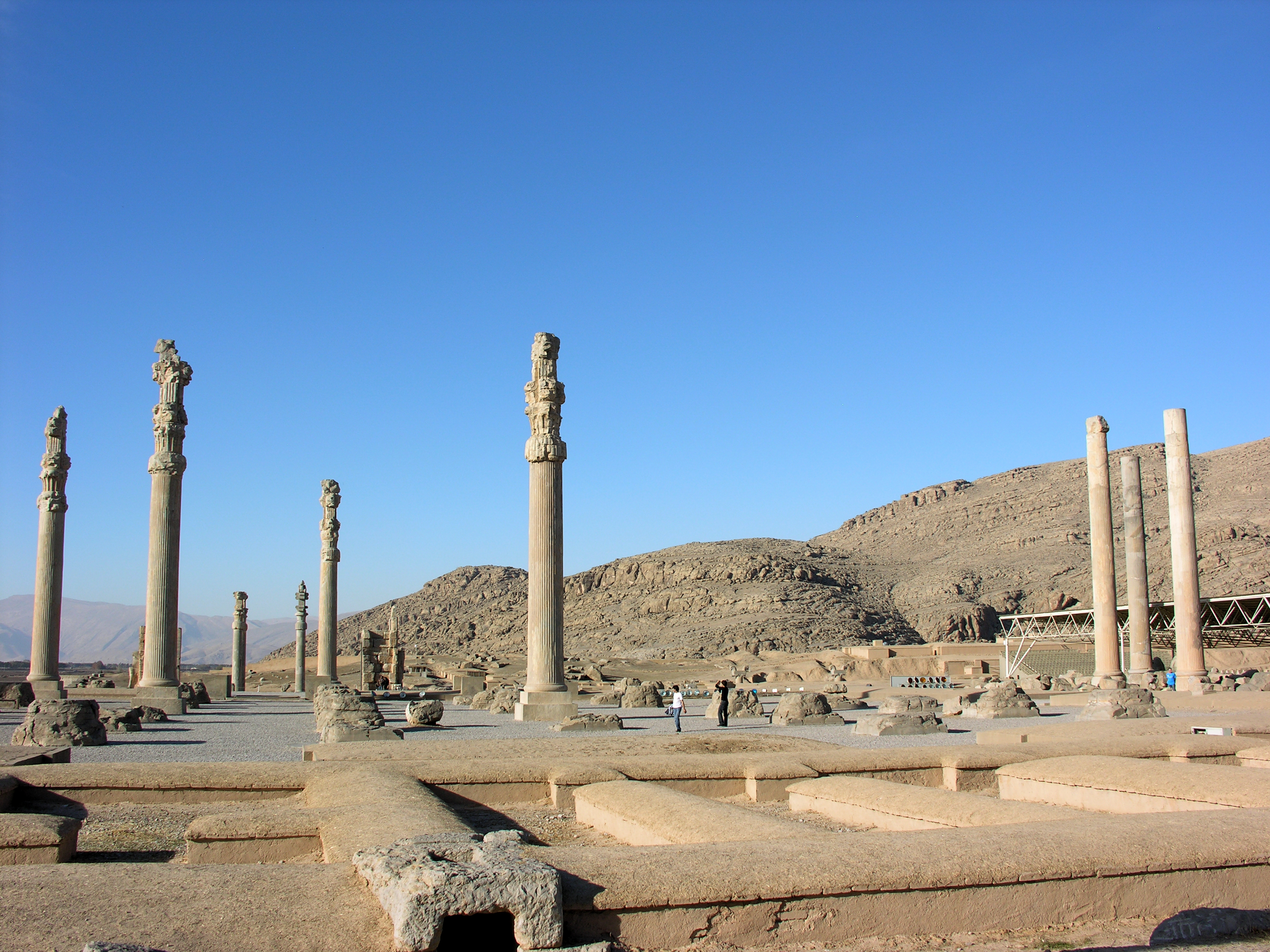 Iran, Apadana